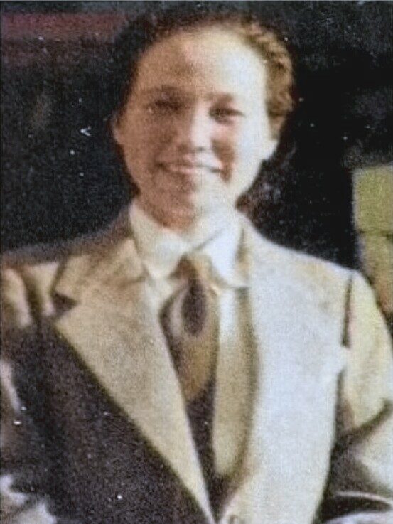 謝雪紅女士